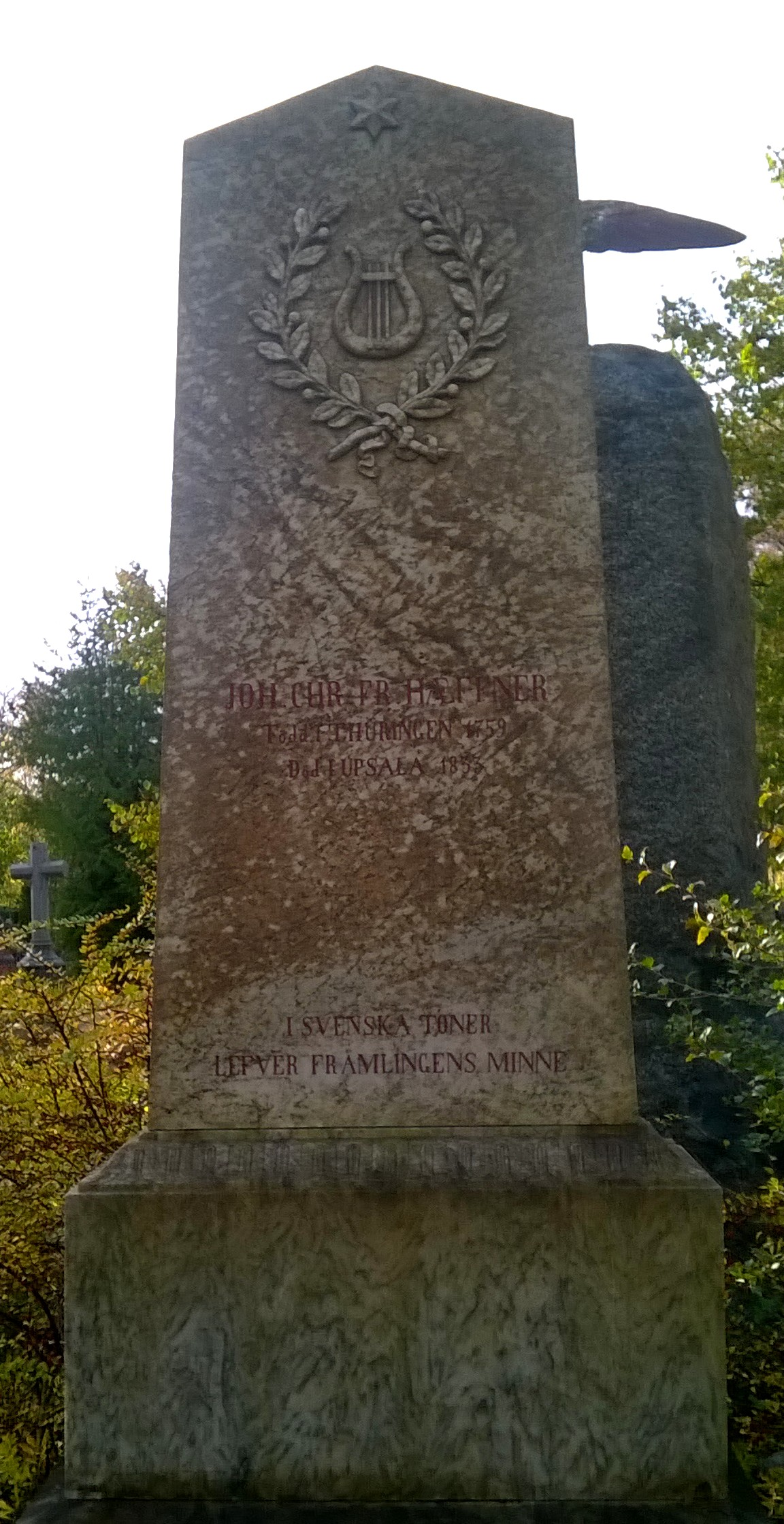 Gravsten på grav. Director musices vid Uppsala universitet, Johann Christian Friedrich Haeffner (1759-1833).